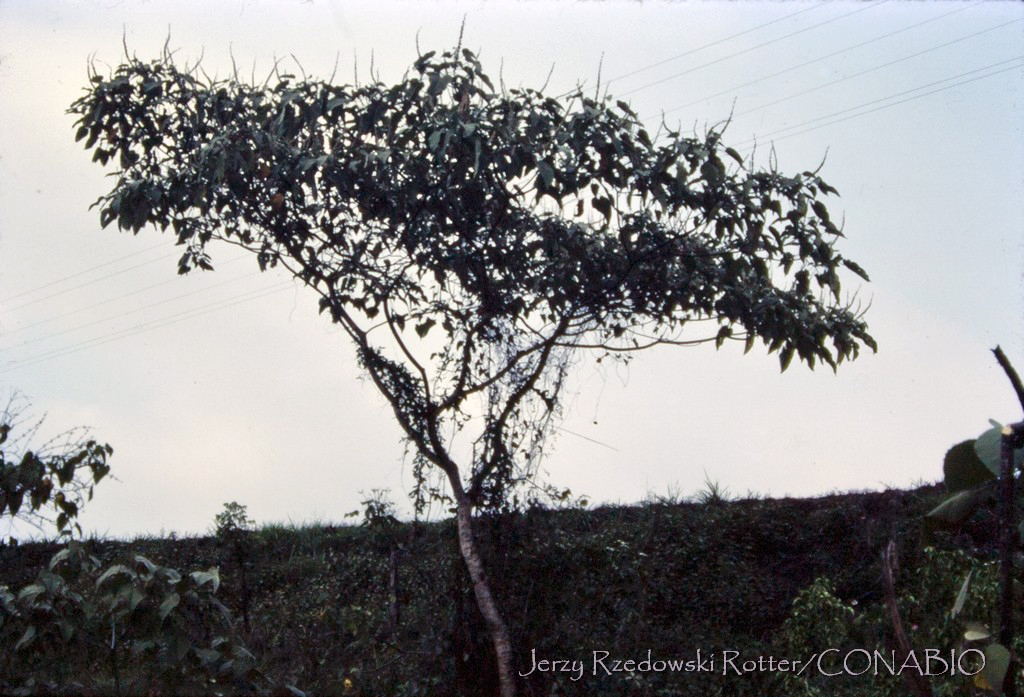 Croton draco, sangre de drago, port de l'arbre (photo de Jerzy Rzedowski Rotter / CONABIO)